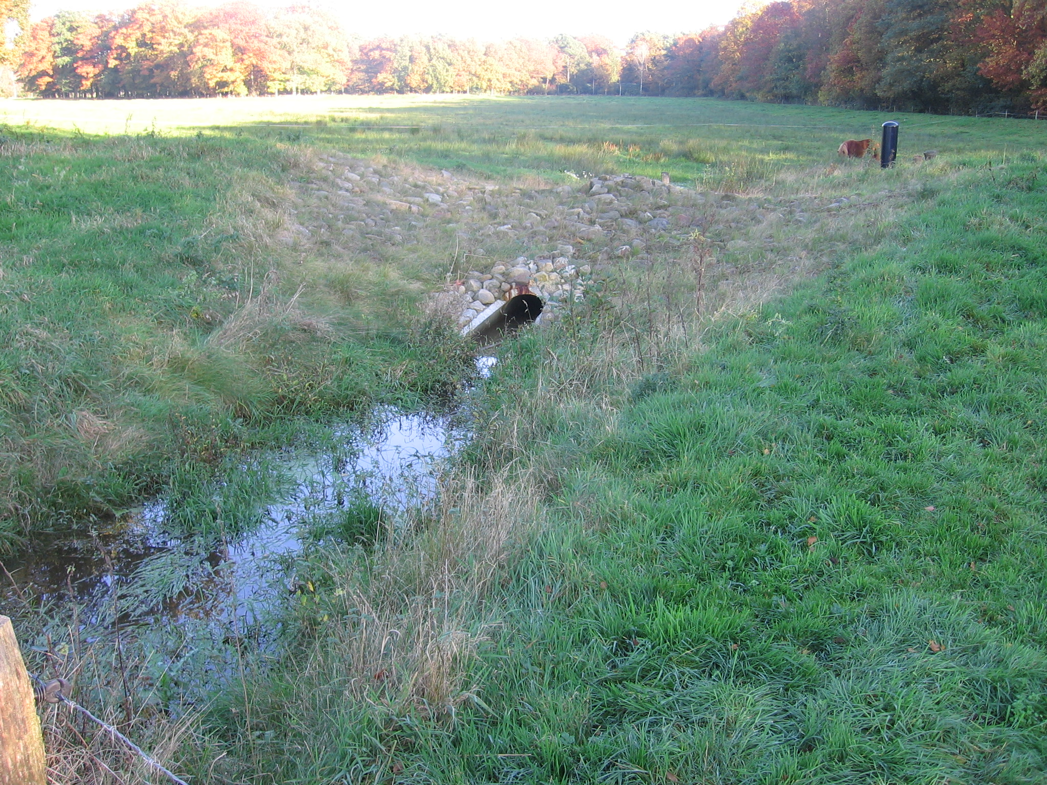 Dit is een foto die ik zelf genomen heb tijdens een excursie naar het retentiegebied Baasdam op 30 oktober 2005. Naam: Titico.